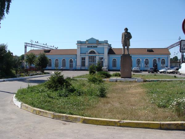 Станція Деражня